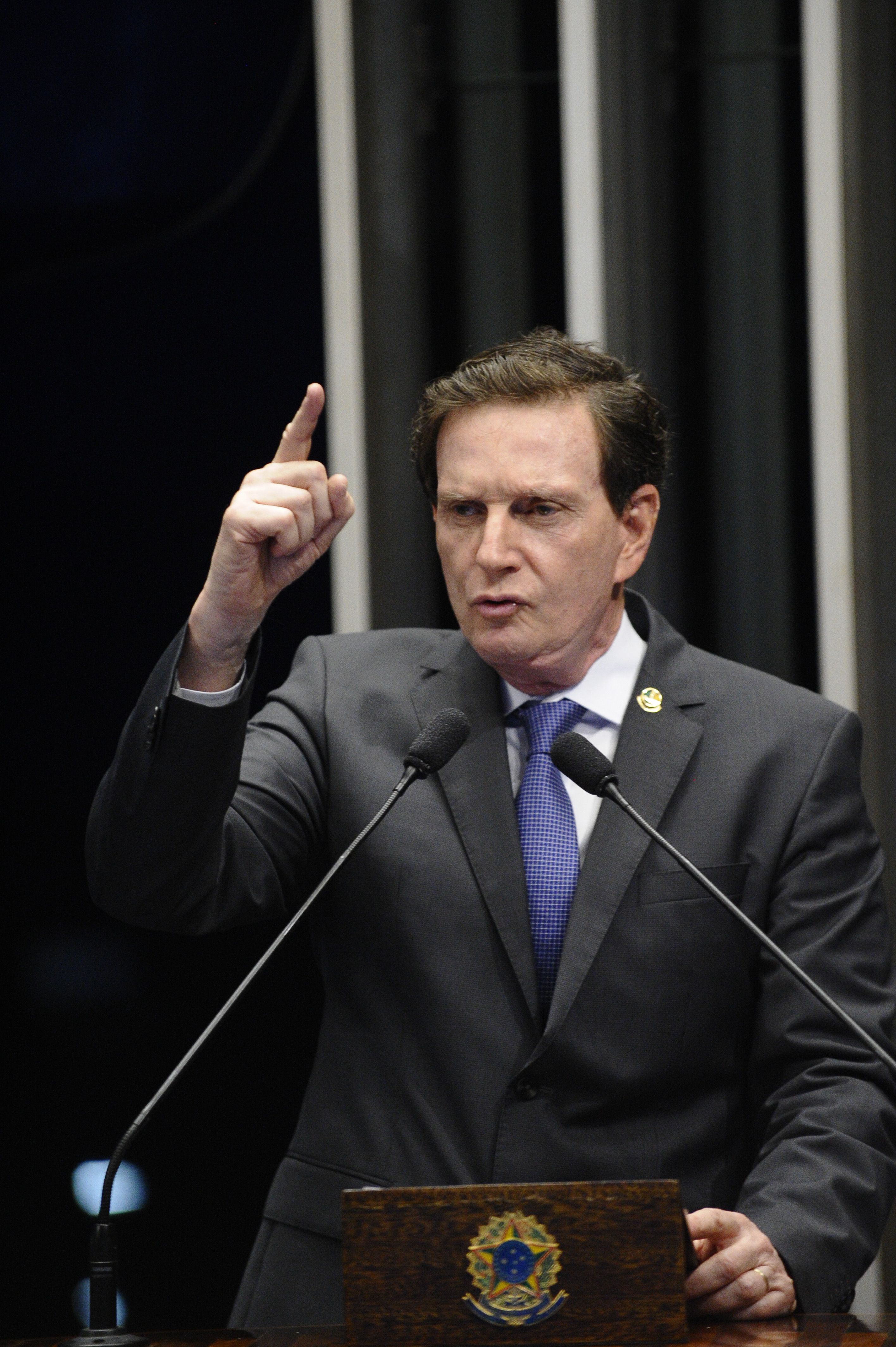 Plenário do Congresso Nacional durante sessão solene. Em discurso, senador Marcelo Crivella (PRB-RJ). Foto:Edilson Rodrigues/Agência Senado